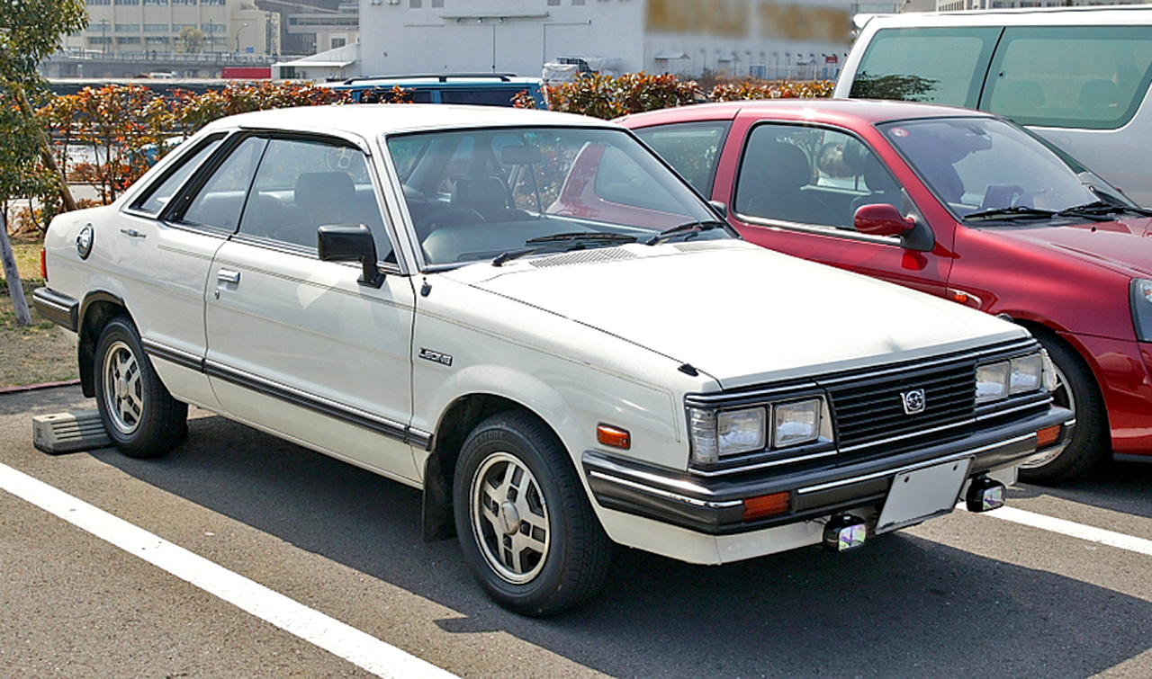 Subaru Leone Hardtop